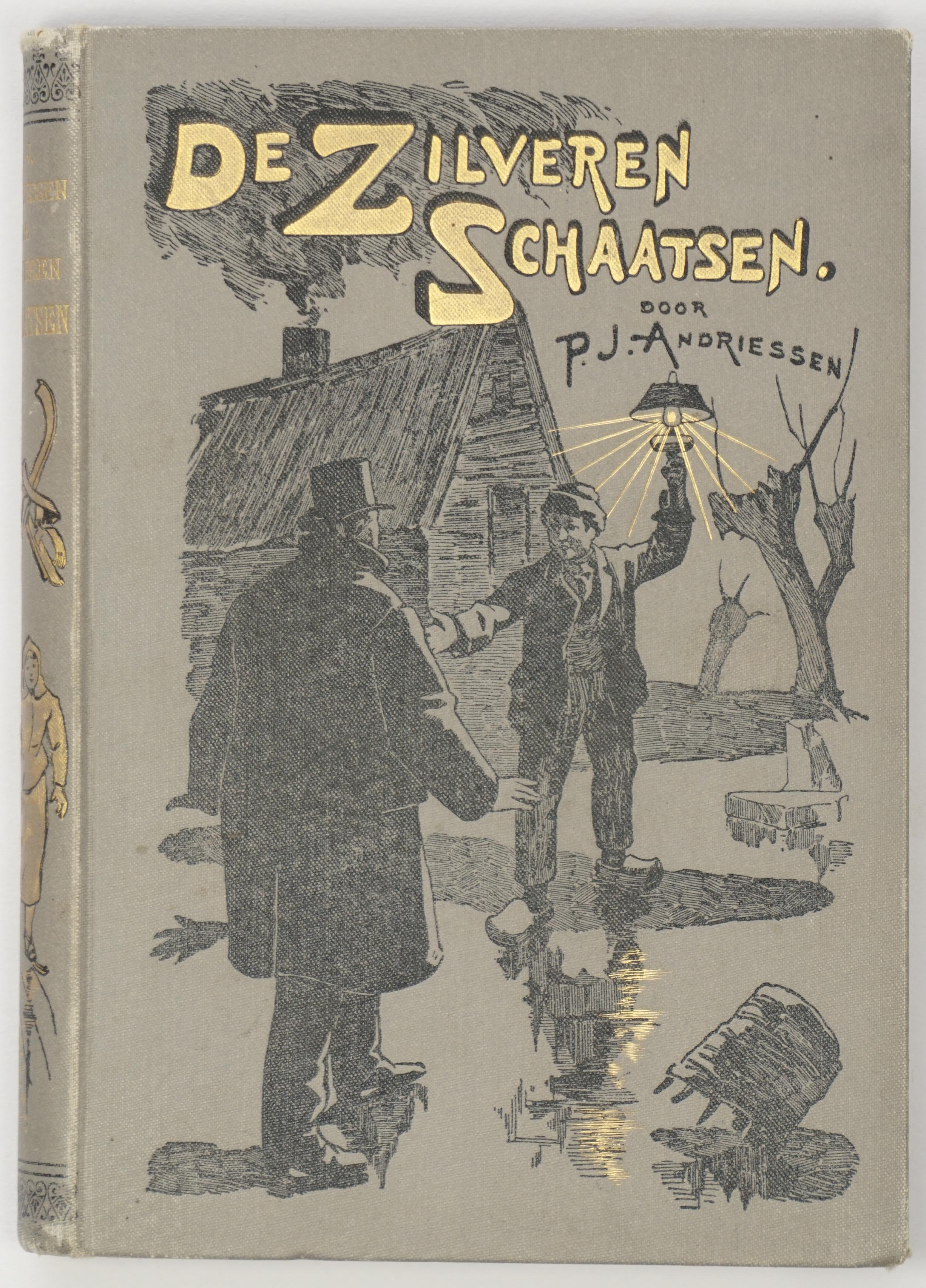 Hans Brinker Andriessen 1892 5e druk kaft